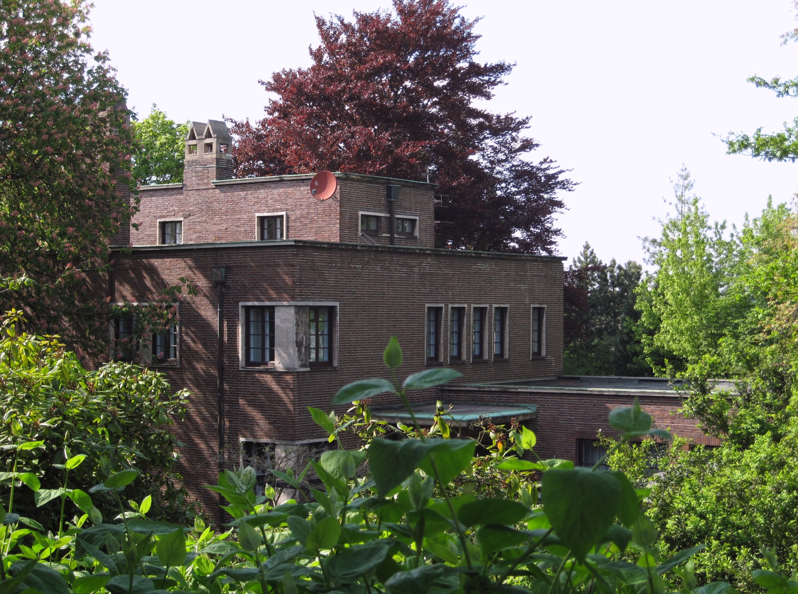 Villa Heutelbeck in Iserlohn, Im Tückwinkel 7. This image shows a heritage building in Germany, located in the North Rhine-Westphalian city Iserlohn (no. 194).